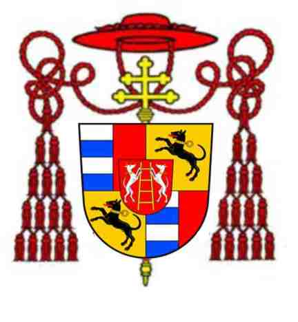 Wappen Wappen Kardinal Johann Pilipp Graf Lamberg 1652-1712, Bischof von Passau (1689-1712)